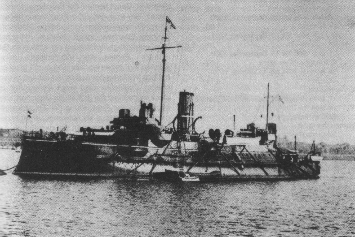 Das deutsche Küstenpanzerschiff SMS Siegfried Anfang der 1890er Jahre.